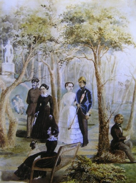 1851. На картине изображены Г. С. Тарновский с племянницей Юлией (в белом платье), на скамейке - Надежда Тарновская, слева В. В. Тарновский-старший с женой. Себя Волосков изобразил себя сидящим справа